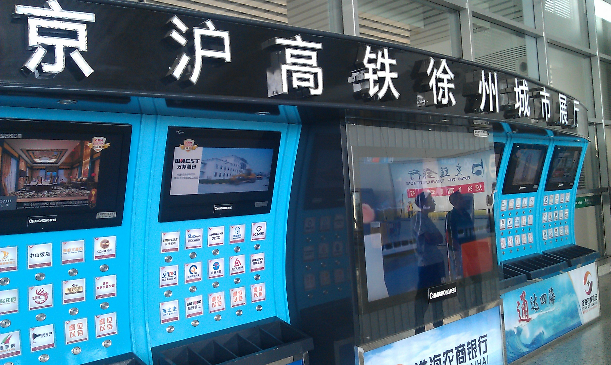 京滬高速鉄道徐州のシティ展示ホール、徐州東駅の待合室にある。